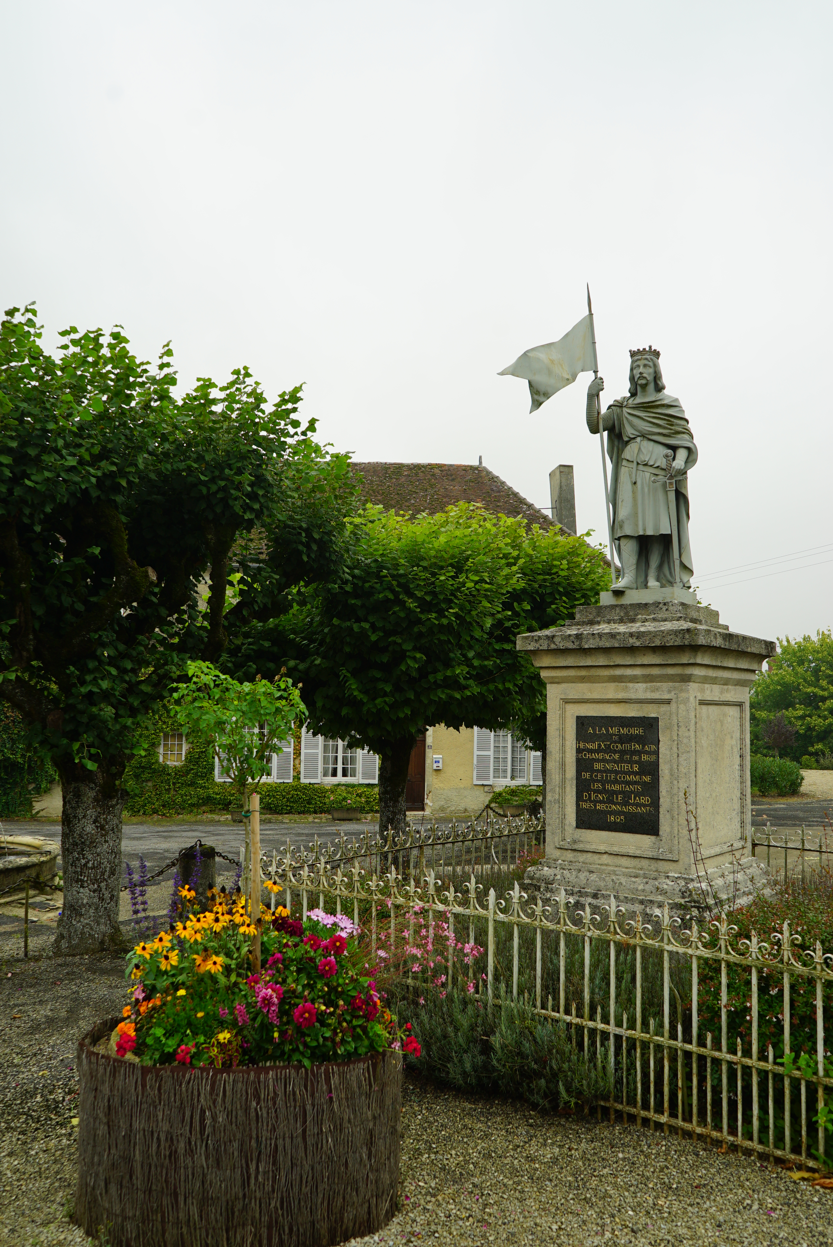 à igny, la tatue d' henri le large.